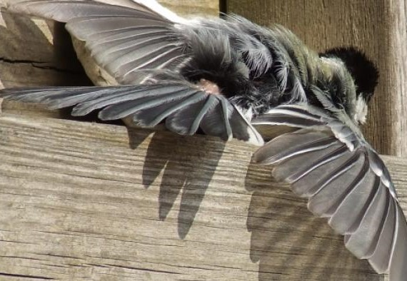 Vogels houden van een zonnebad.